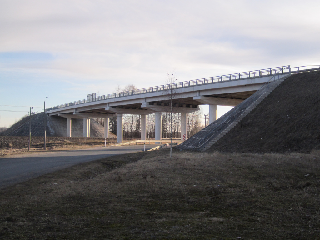 Vaade Kadrina viaduktile aleviku poolt